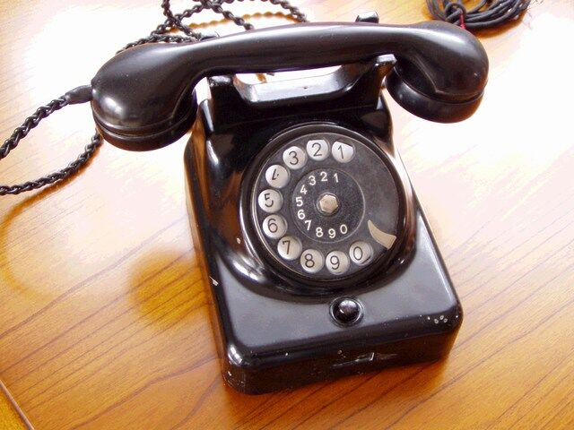 Tischfernsprecher W46 von SABA